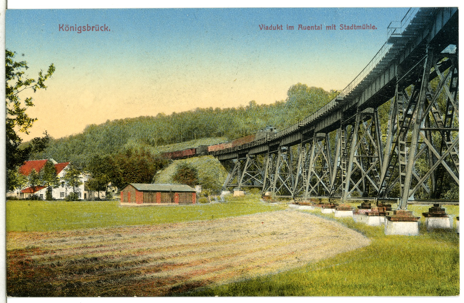 Königsbrück; Viadukt im Auental mit Eisenbahn und Stadtmühle This postcard is from publisher Brück & Sohn in Meißen ( This postcard has a unique number 13086 and is available in a higher resolution at the publisher. This images was uploaded in a cooperation project between Wikipedians and the publisher.